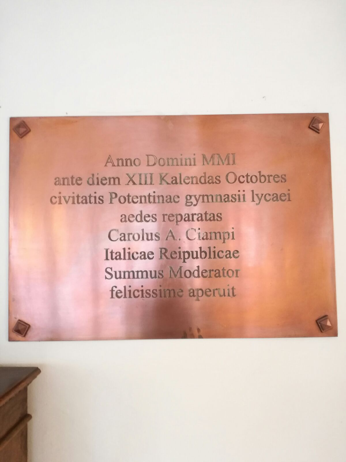 Epigrafe bronzea di riapertura del Liceo Flacco (2001), alla presenza del Presidente della Repubblica, Carlo Azeglio Ciampi